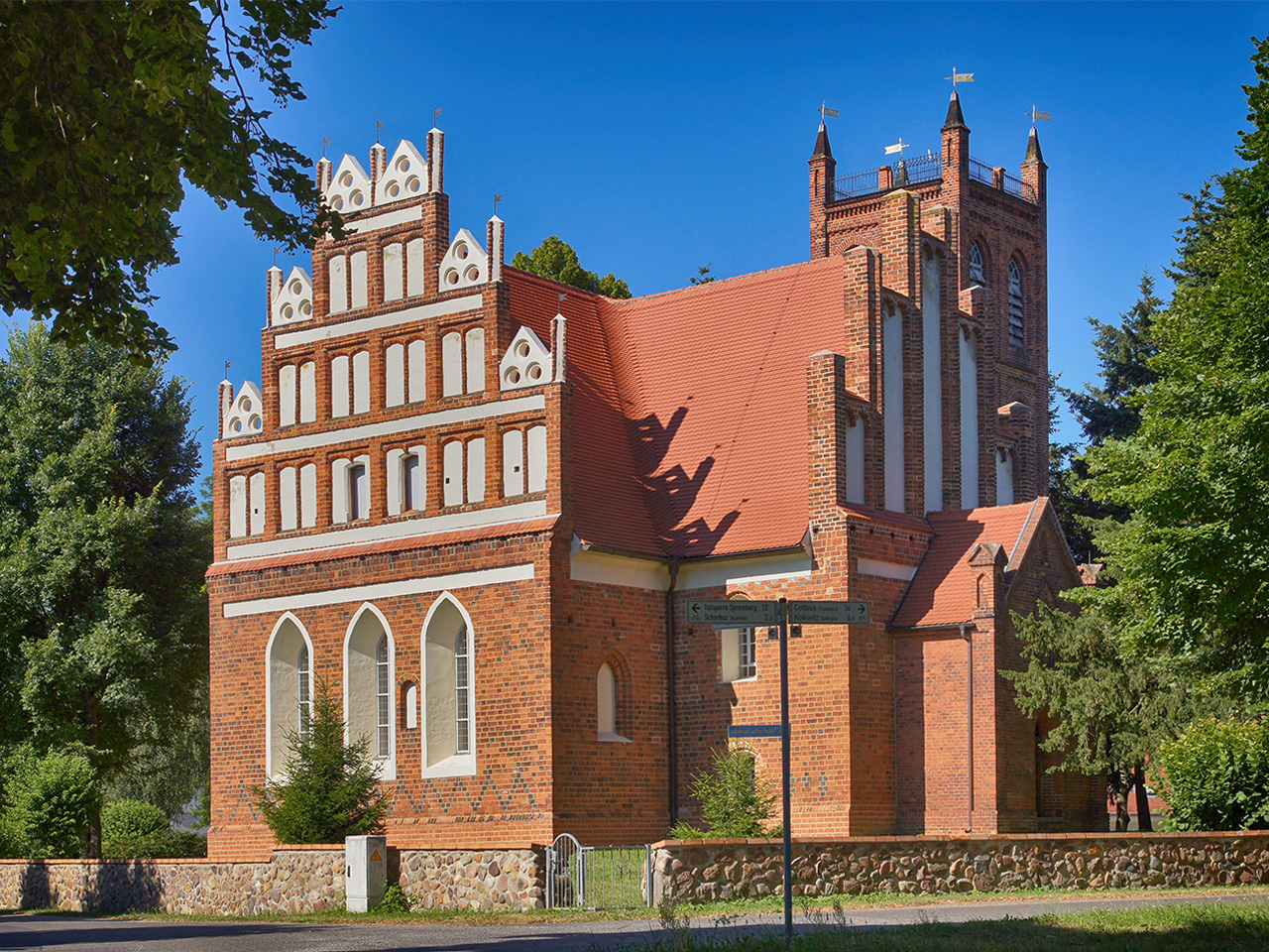 Kirche in Leuthen